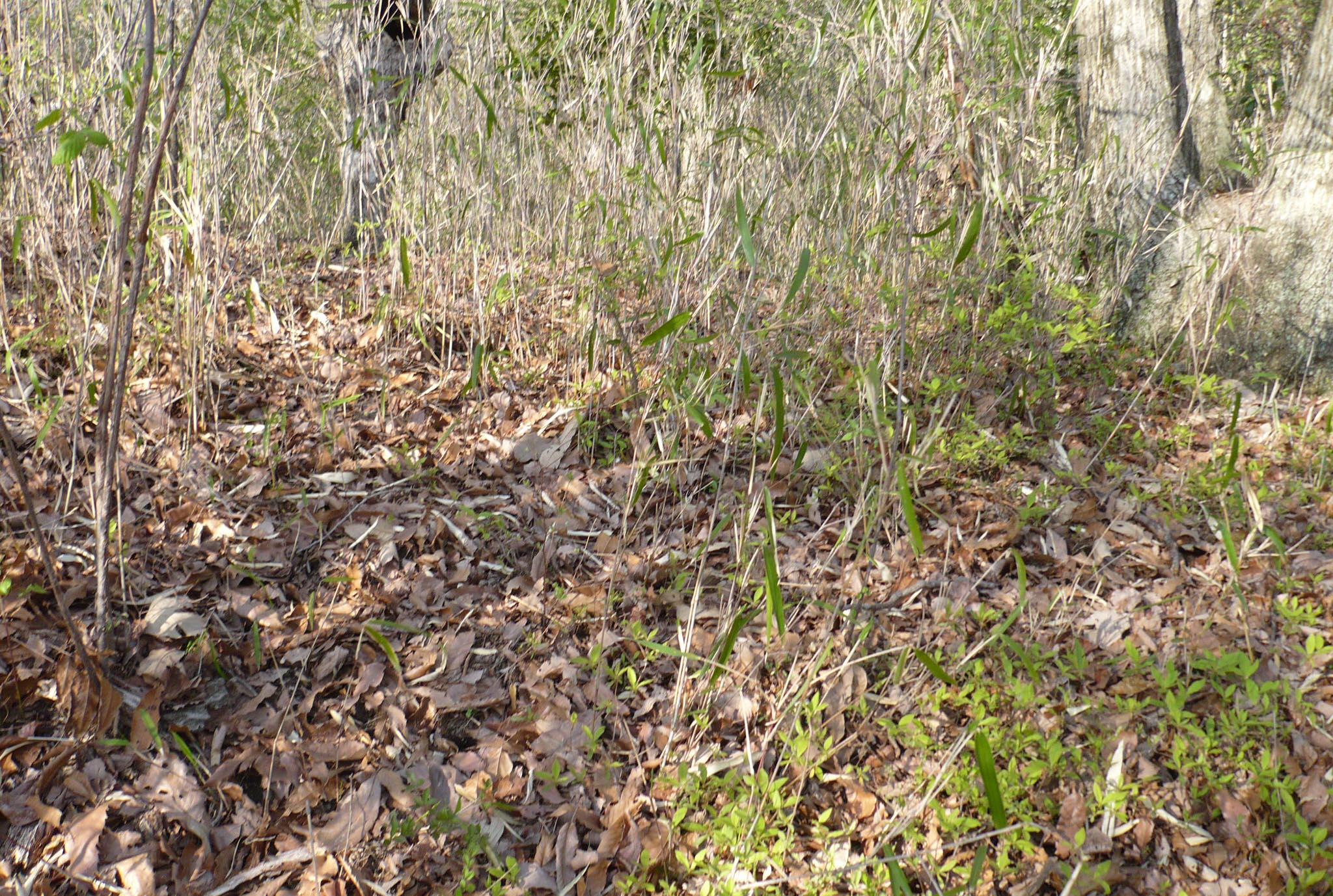 向山の山頂